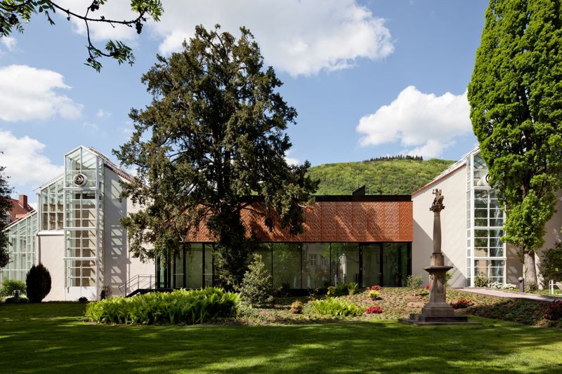 Kunstverein Heidelberg, fotografiert von Thomas Ott